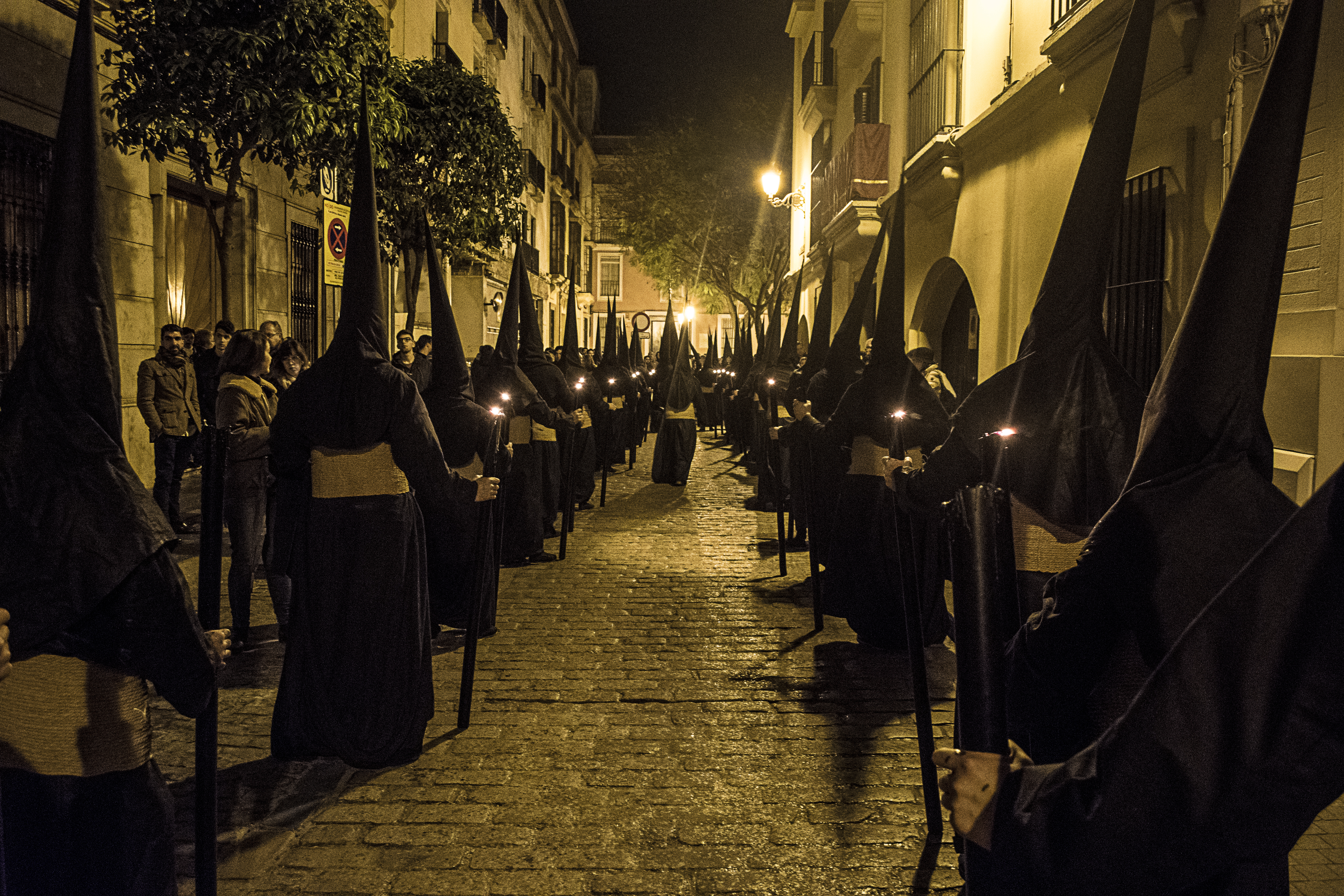 Nazarenos de la cofradía del Calvario, Sevilla.